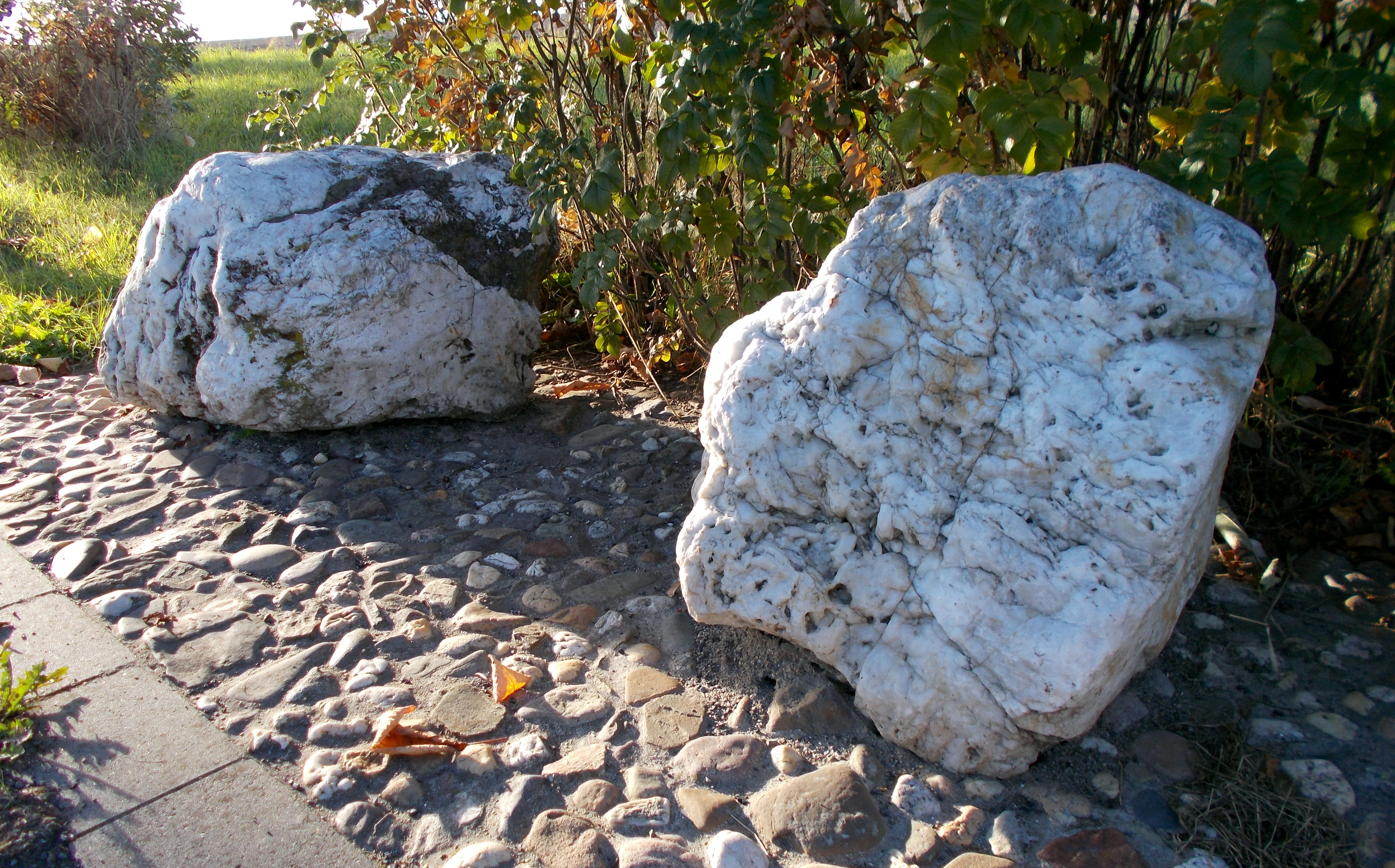 Findlingsweg Sonsbeck Station 6: Milchquarz